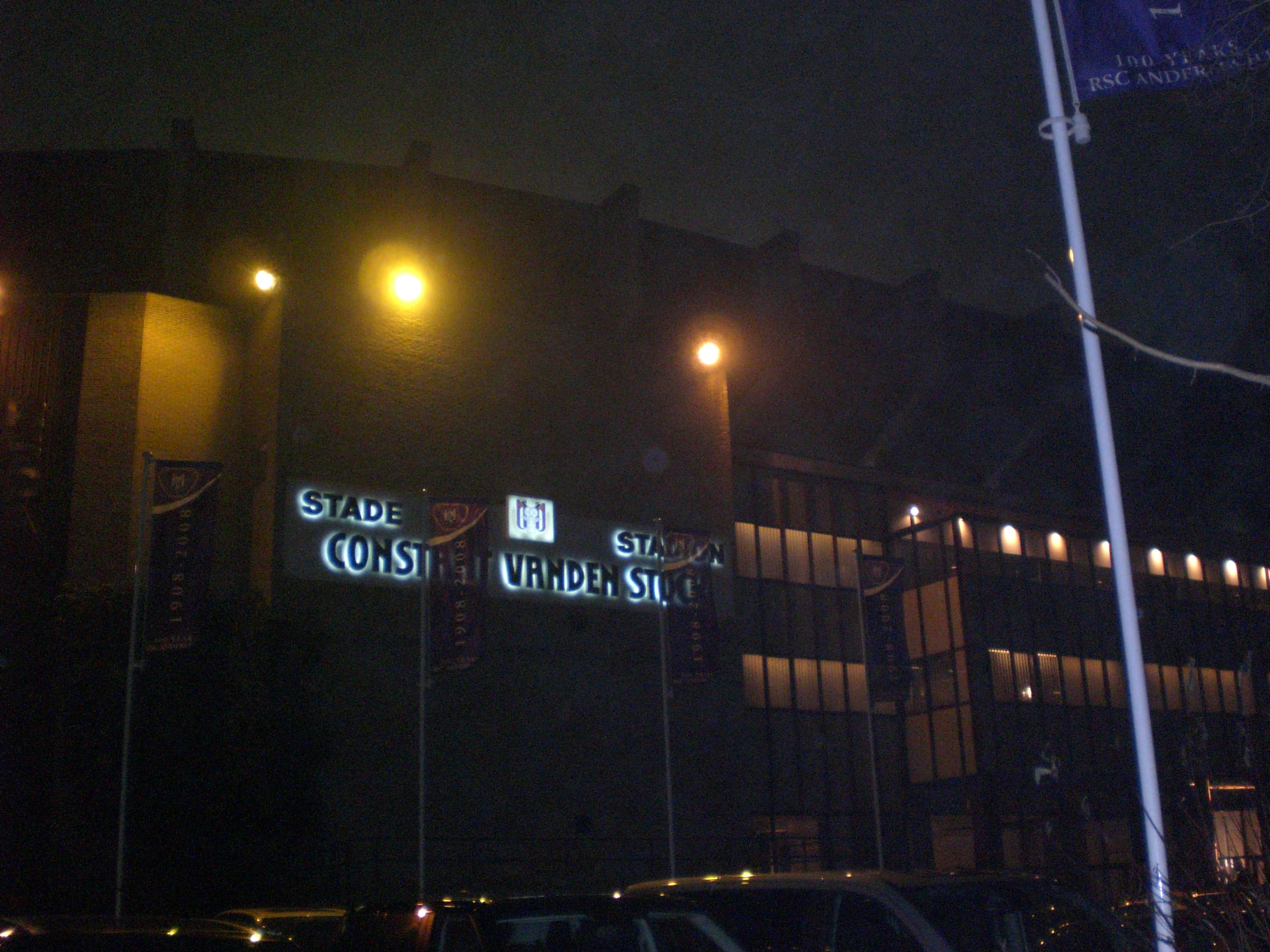 La façade du Stade Constant Vandenstock à Anderlecht, photo prise le 13 février 2008, le soir du match RSC Anderlecht - FC Girondins de Bordeaux(2-1).